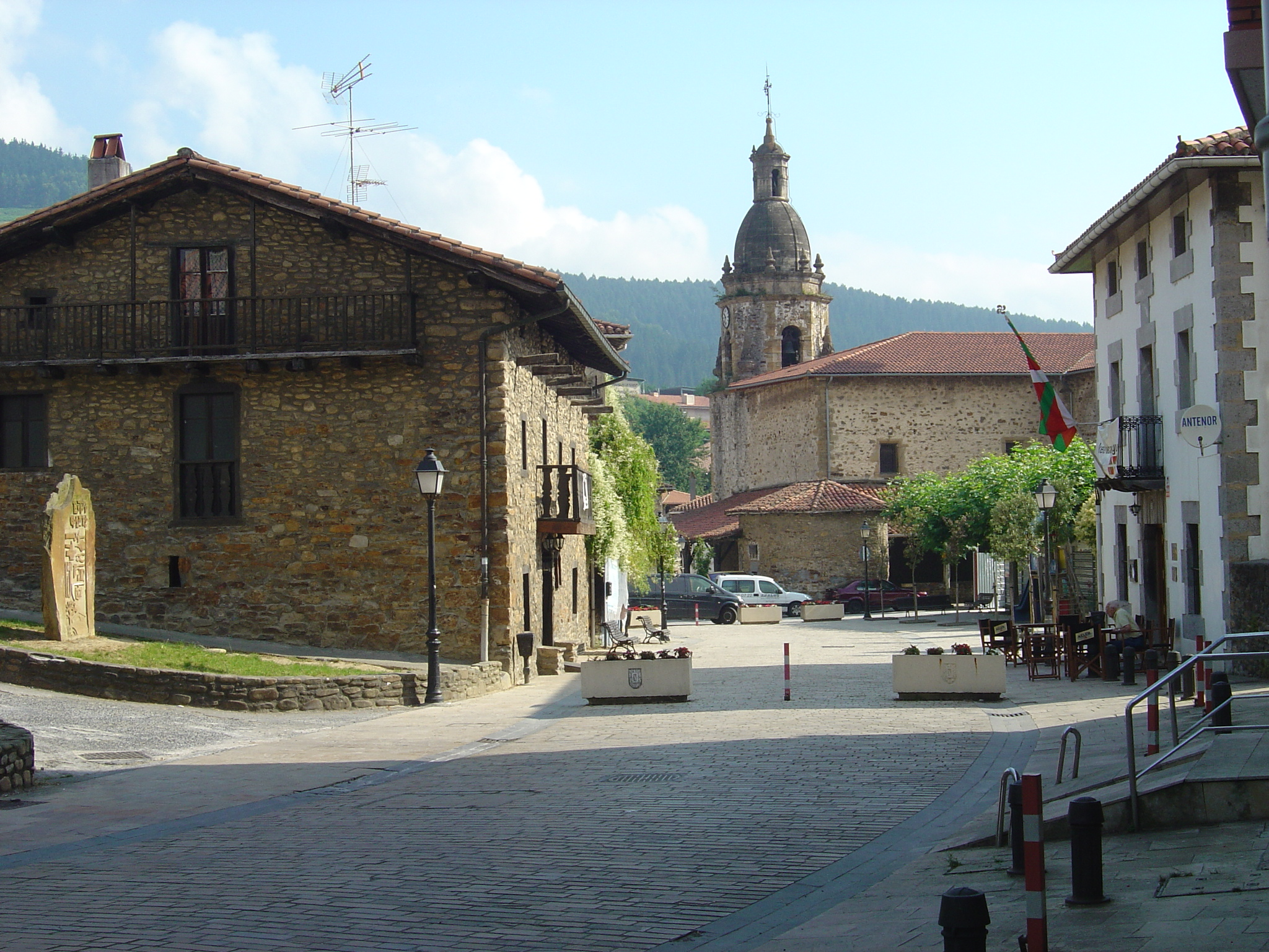 Gizarte-Etxea, Bº Elexalde